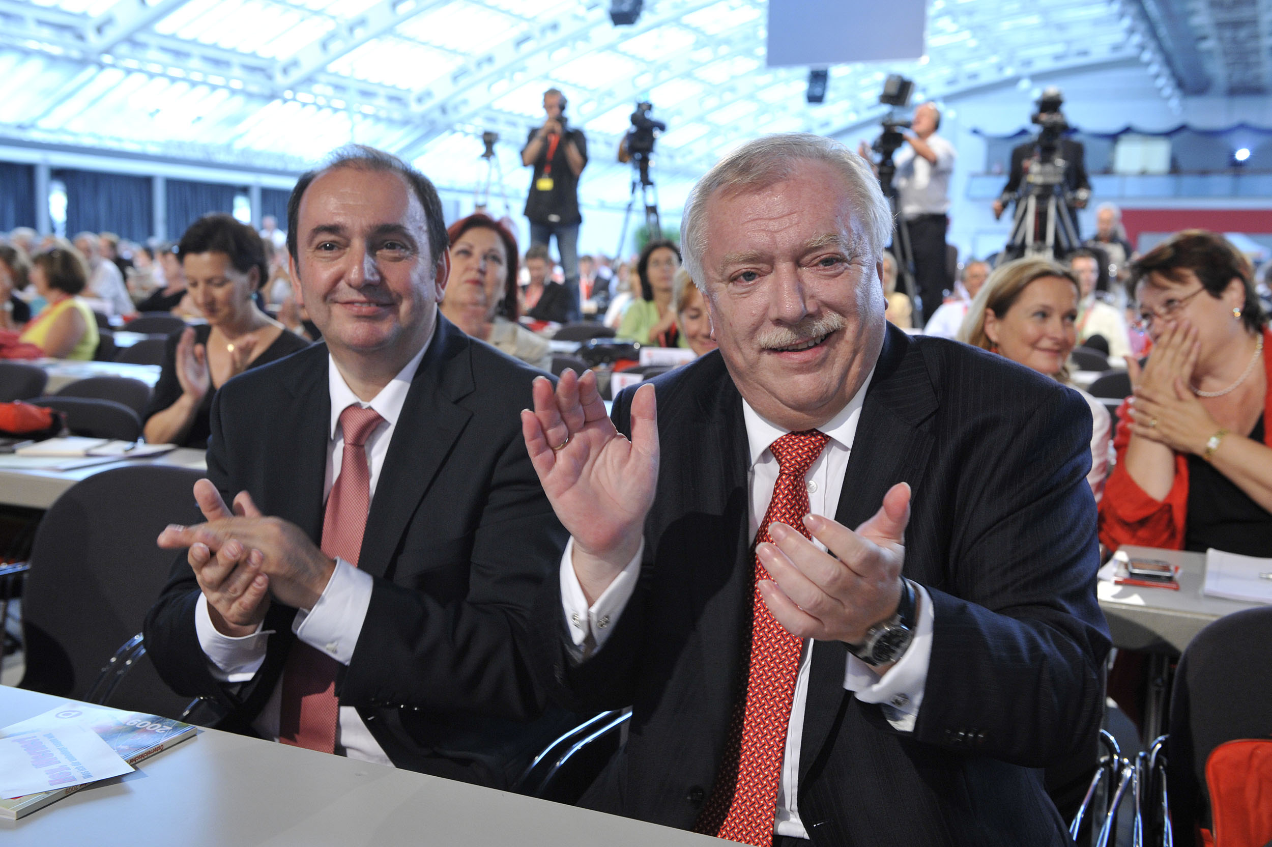 OÖ LHStv. Erich Haider und BGM Michael Häupl am 40. Ordentlichen Bundesparteitag 2008 im Linzer Design-Center. Foto: Johannes Zinner.